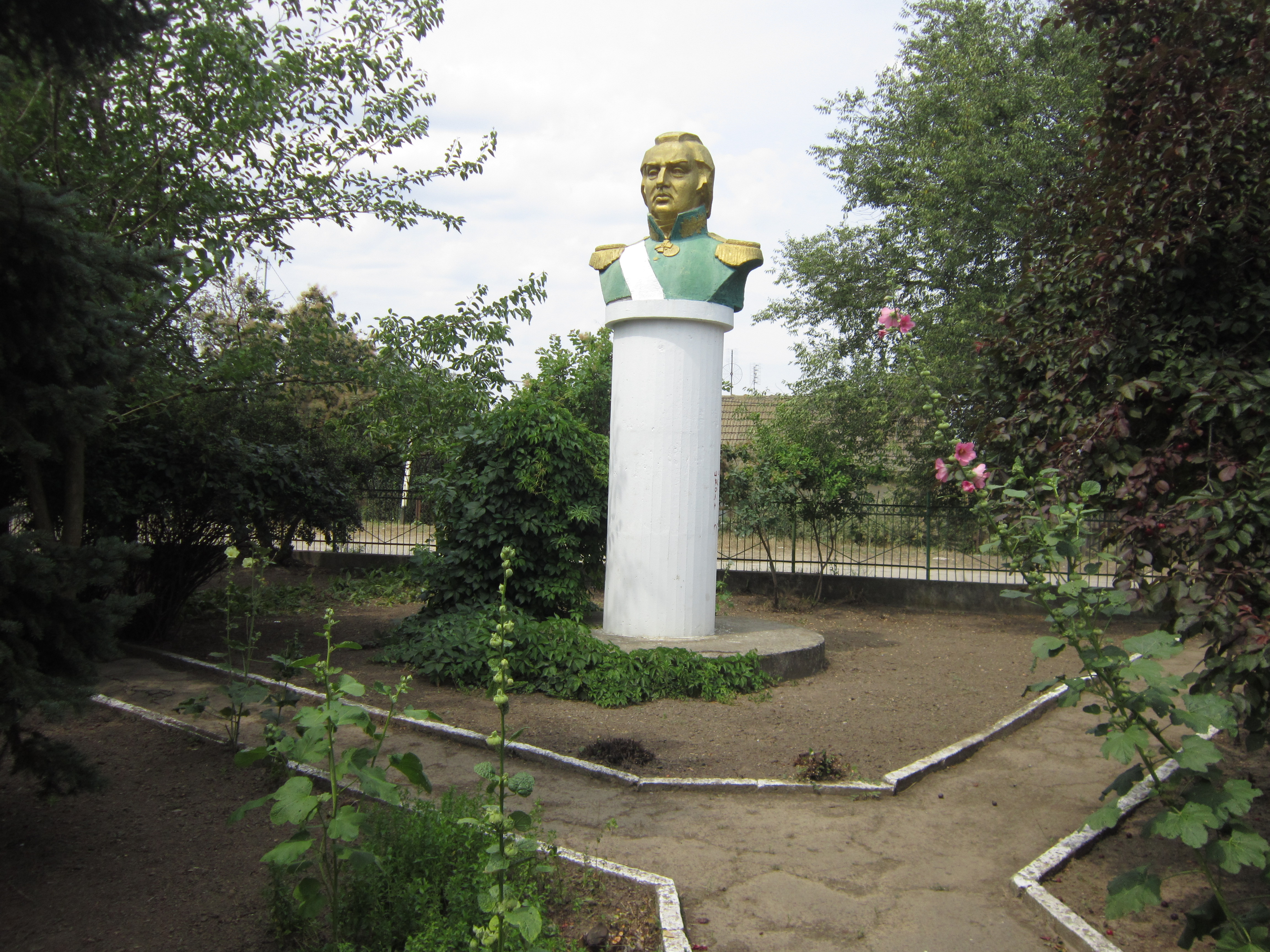 Пам'ятник М.І. Кутузову, село Бритівка, біля контори колгоспу